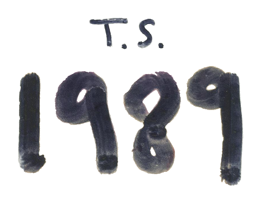 Logo del álbum 1989 de Taylor Swift